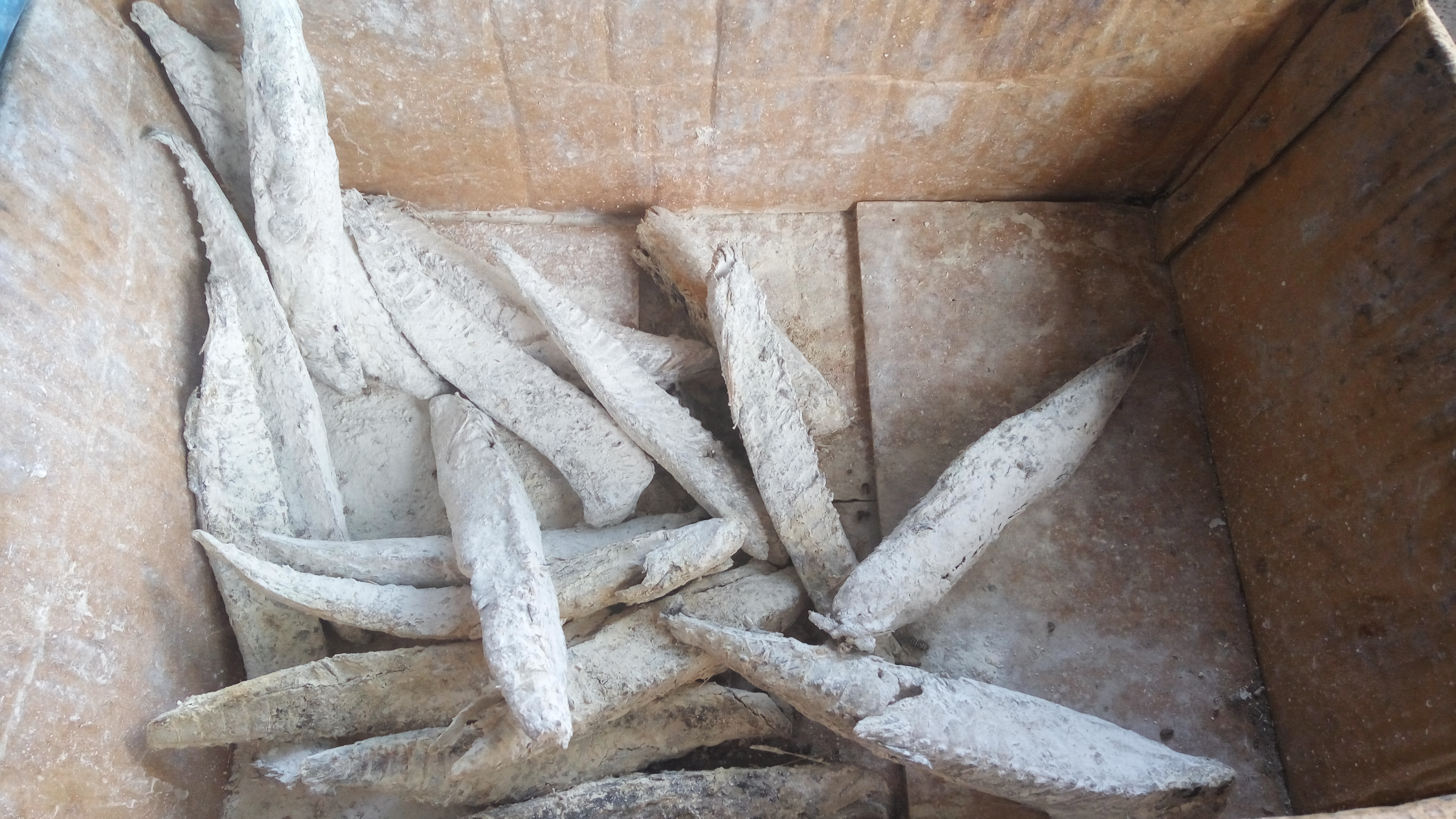 Keumamah adalah makanan tradisional Aceh yang dibuat dari ikan tongkol yang direbus dan dijemur di bawah sinar matahari.